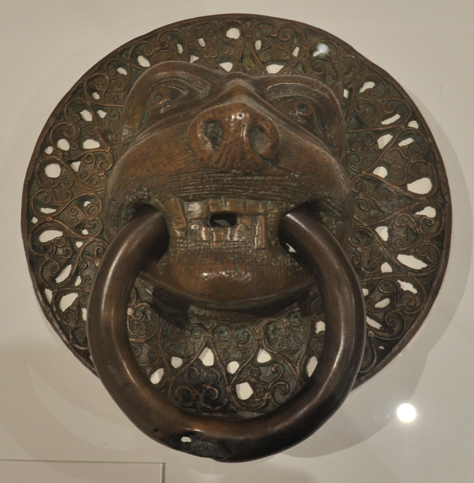 Bregenz, Vorarlberg Museum, Türring in Form eines Löwenkopfs (Bronze, gegossen, gelötet) aus Andelsbuch, 12. Jh. (das einzige erhaltene romanische Kunstwerg aus dem Bregenzerwald) Vorarlberg museum Native namevorarlberg museumLocationBregenz, Vorarlberg, AustriaCoordinates47° 30′ 15.84″ N, 9° 44′ 48.01″ E Established1857Web pageVorarlberg Museum websiteAuthority control : Q2533480 VIAF: 124303291 ISNI: 0000 0001 2242 622X LCCN: n50051186 GND: 18871-2 SUDOC: 030717523 WorldCat institution QS:P195,Q2533480